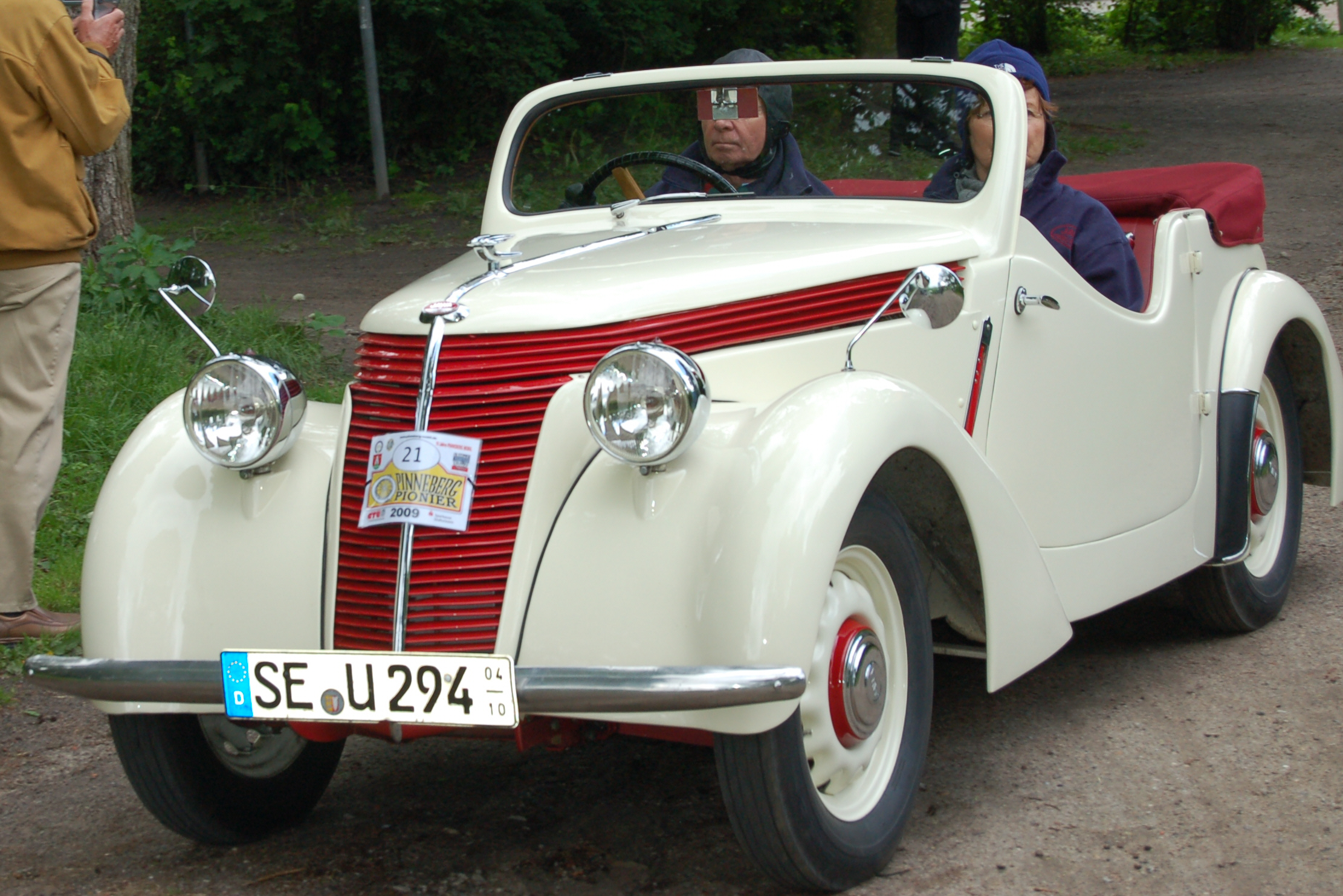 Ein Jawa Minor, 2 Zylinder, 600 ccm, 18 PS, Baujahr 1938 auf dem Weg zum Oldtimertreffen in Uetersen